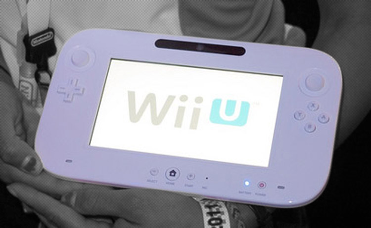 Nintendo Wii U controller @ Electronic Entertainment Expo (E3) 2011